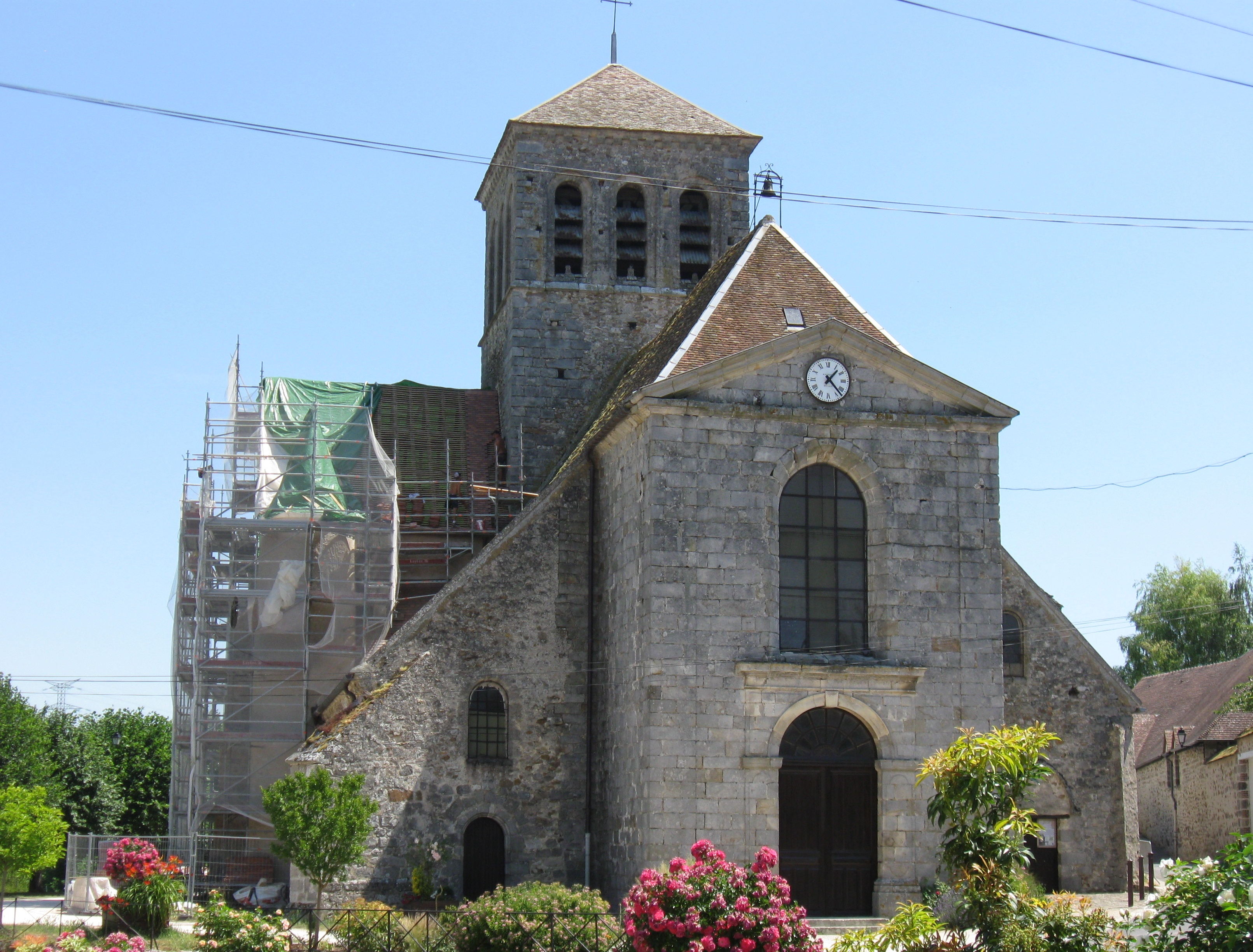 Église Saint-Georges de Chalautre-la-Grande. (Seine-et-Marne, région Île-de-France).